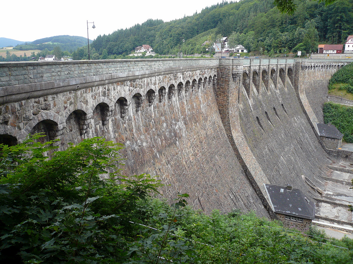 Diemelstausee